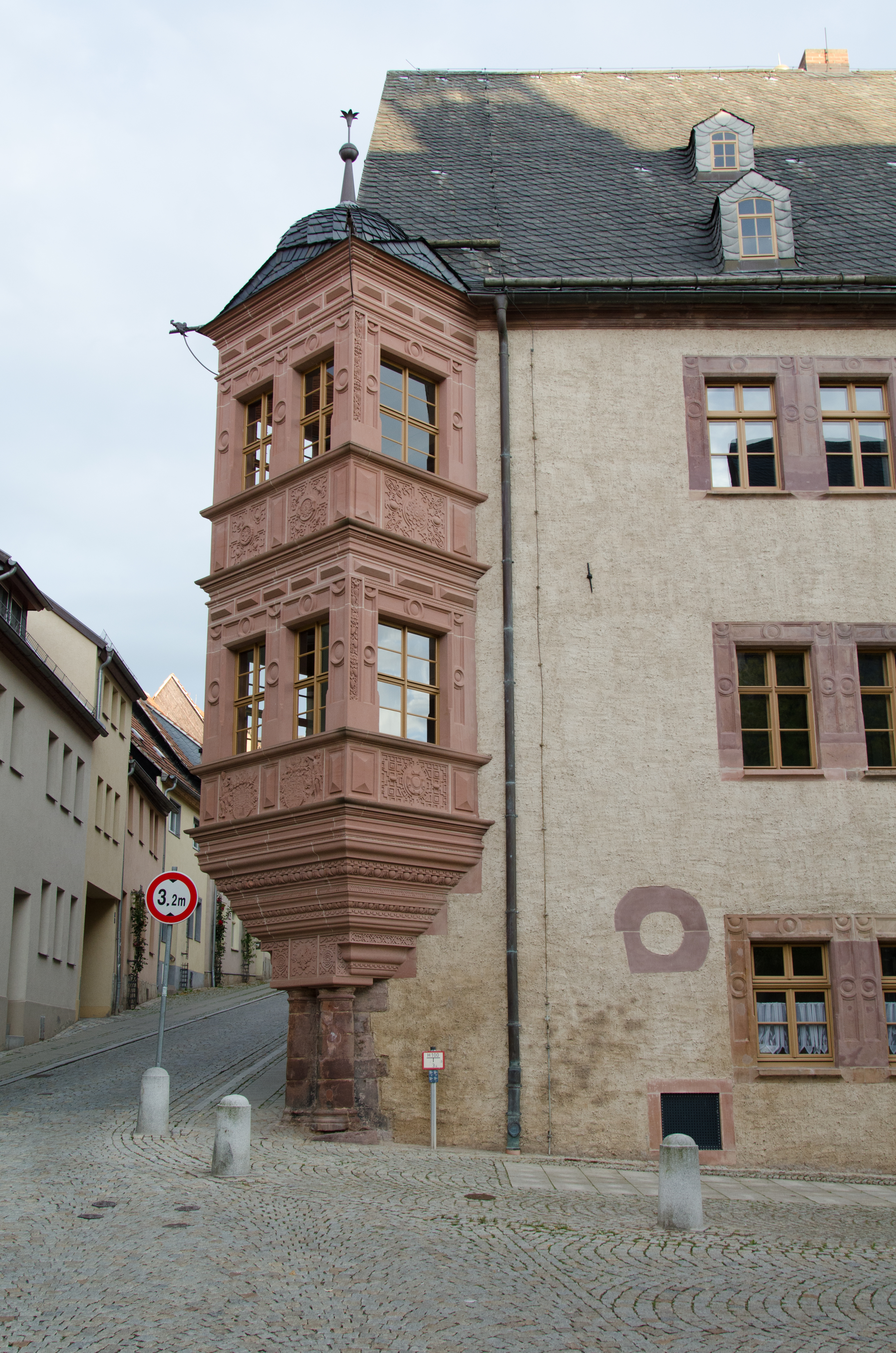 Sangerhausen, Markt 3, Schloss